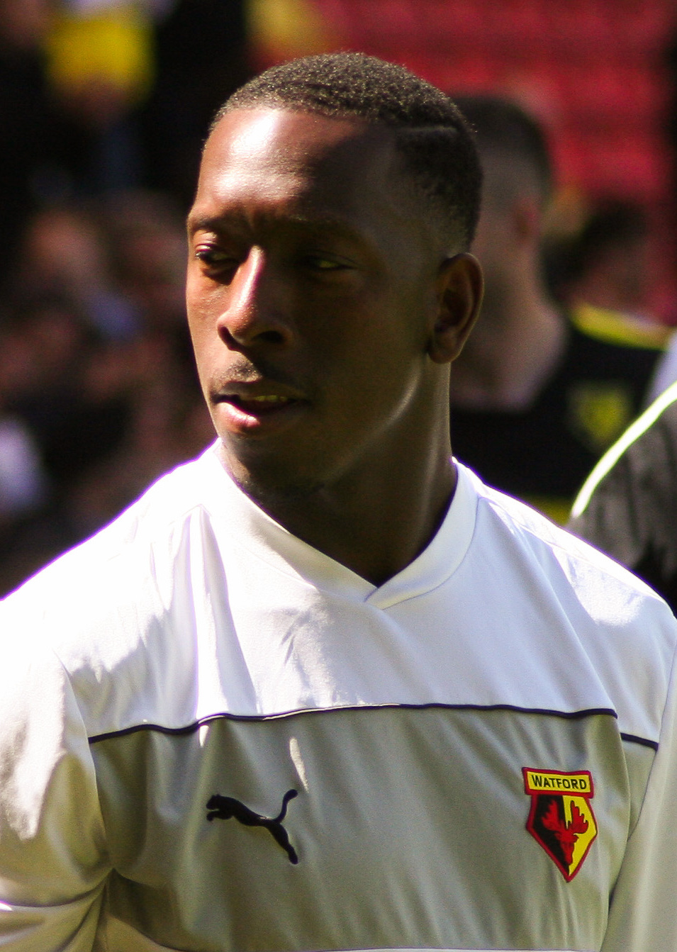 Lloyd Doyley